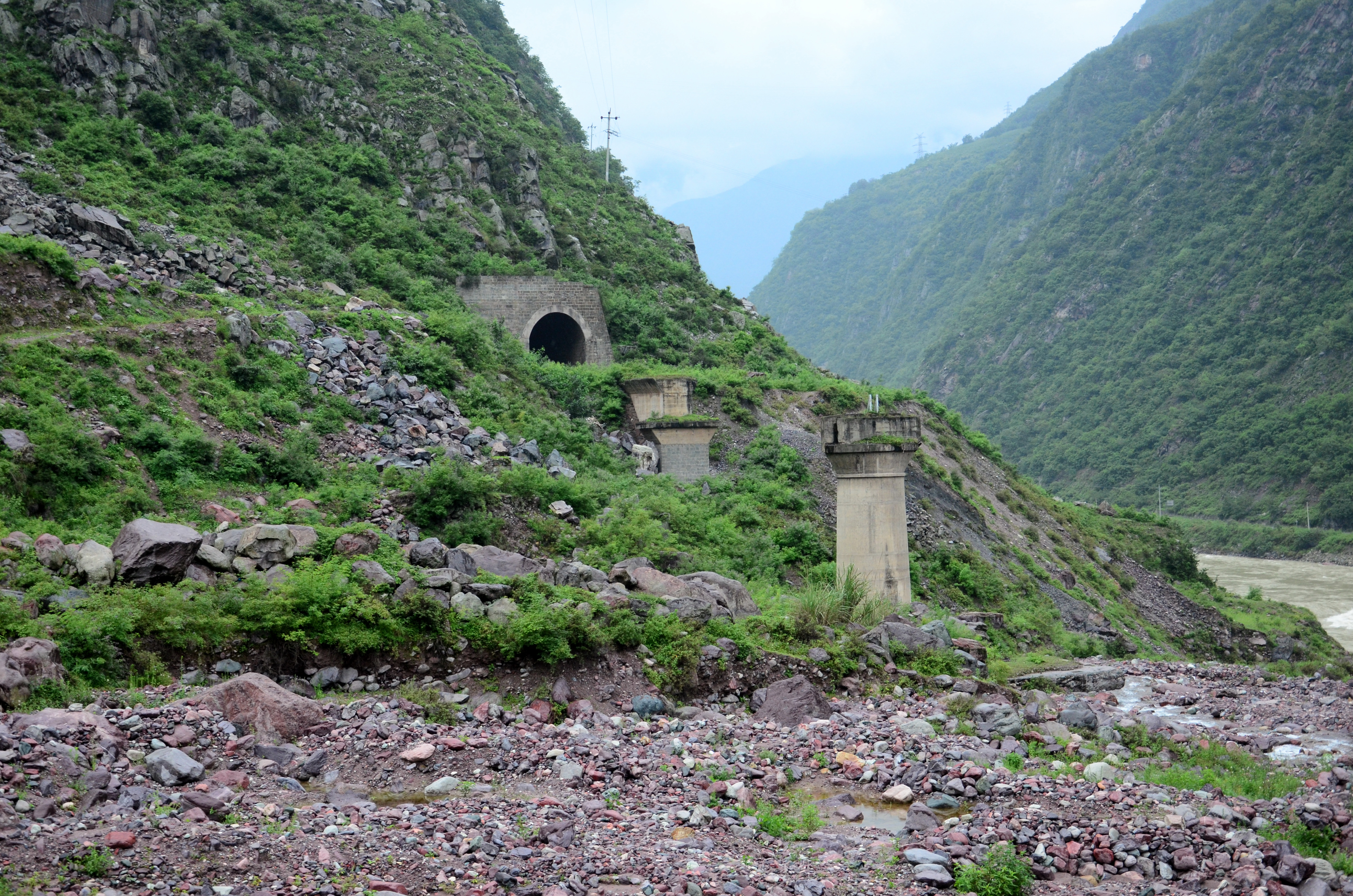 利子依达大桥遗址